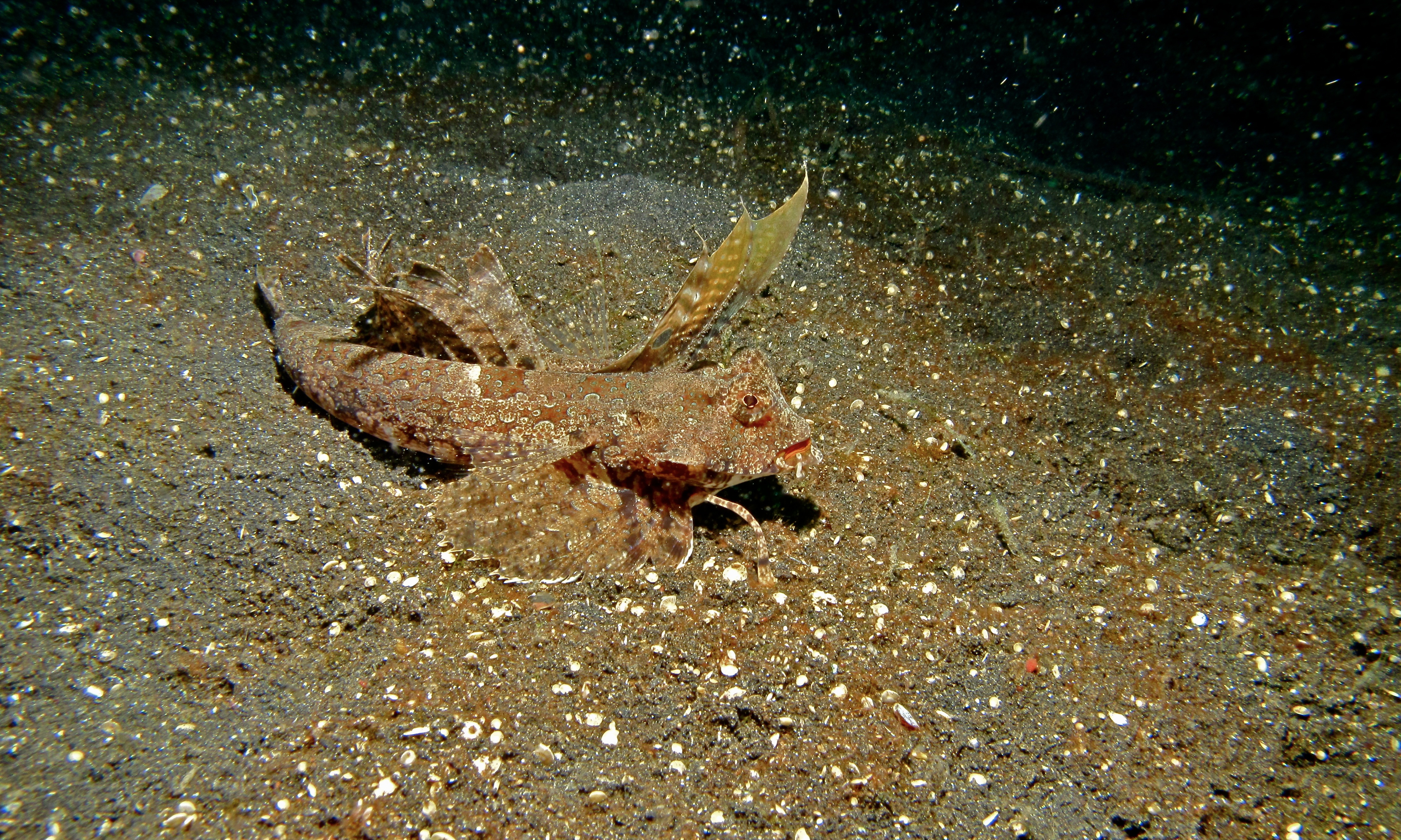 TK1, Lembeh Strait, Sulawesi, INDONESIA